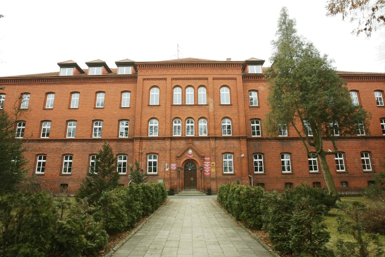 Gmach Technikum Leśnego w Tucholi